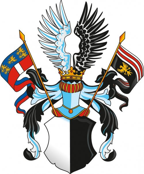 Abensperg-Traun Wappen